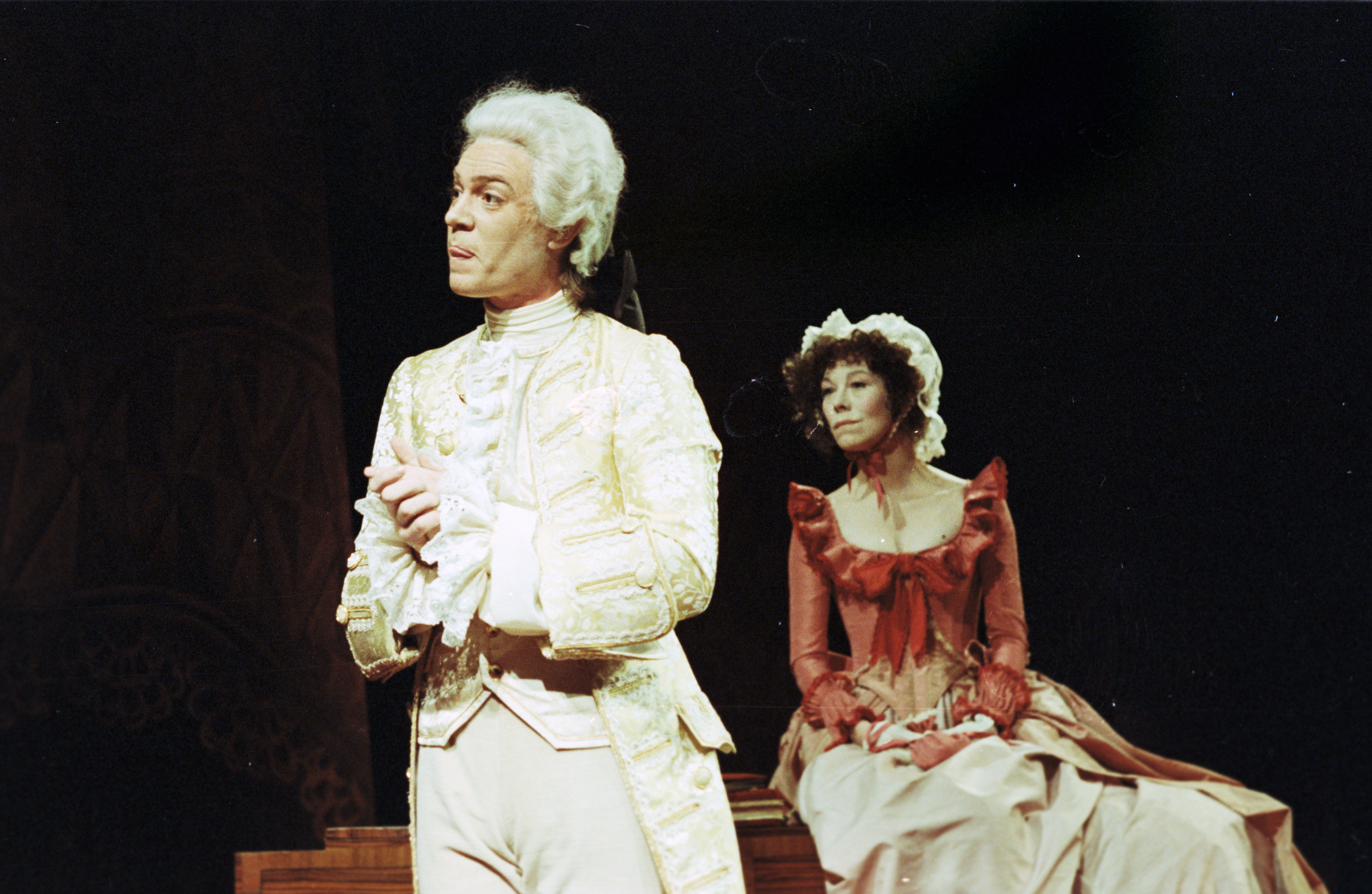 En scene fra Nationaltheaterets oppsetning av Peter Shaffers "Amadeus". Forestillingen hadde premiere 9. desember 1980. Regi var ved Toralv Maurstad, kostymer ved Bruce Snyder og scenografi ved Lubos Hruza.